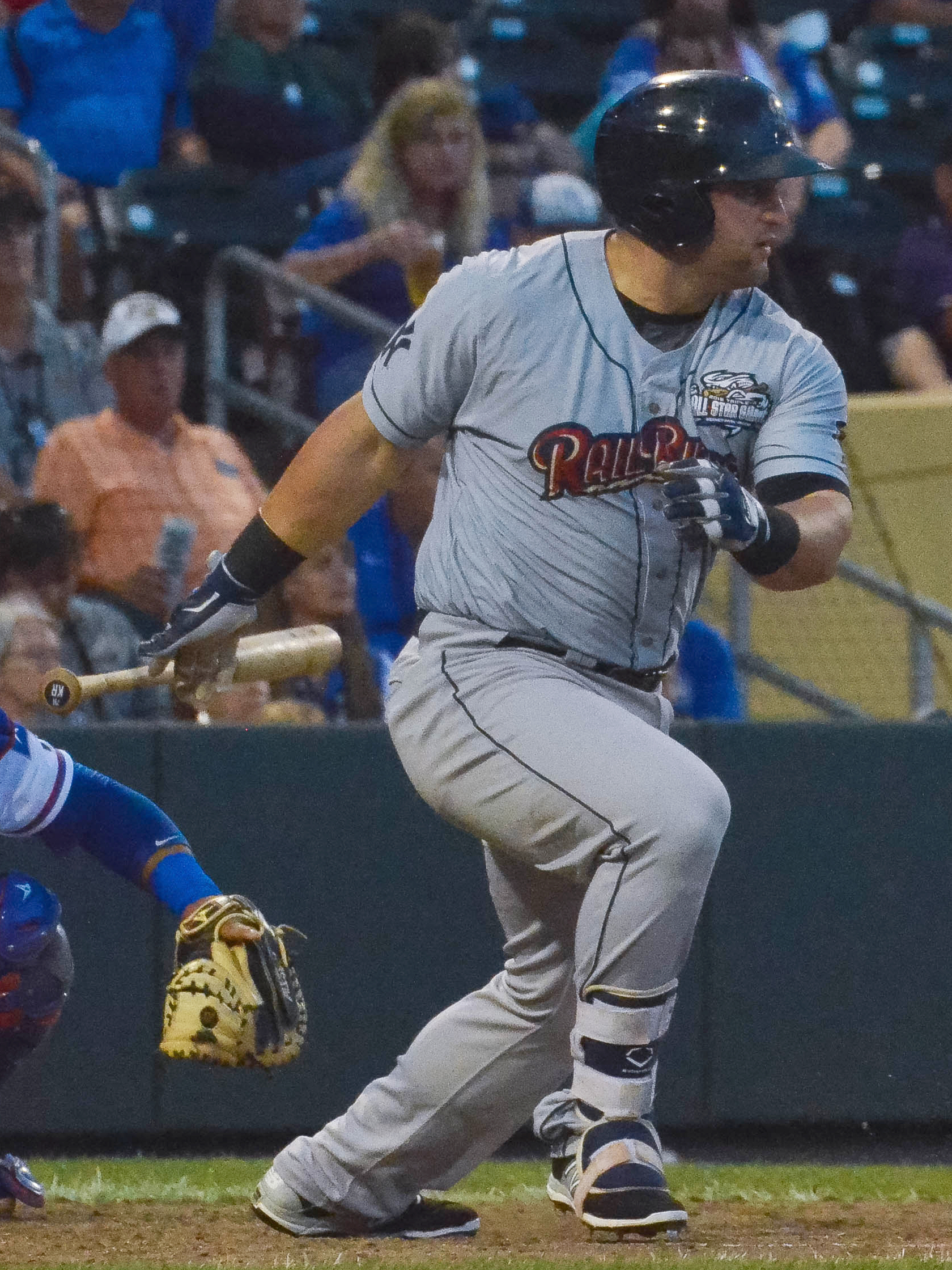 Kyle Roller